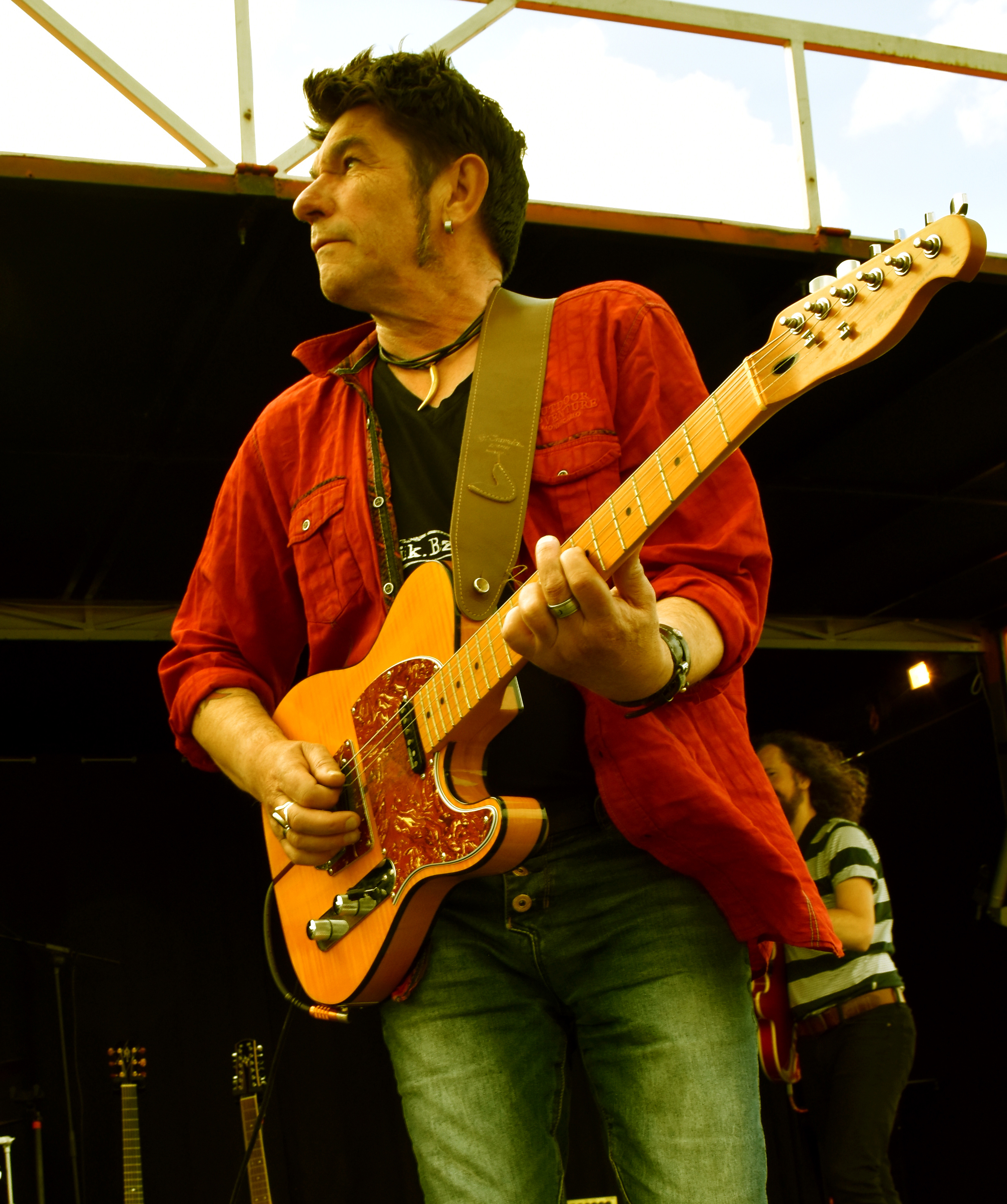 Dom DufF (2)